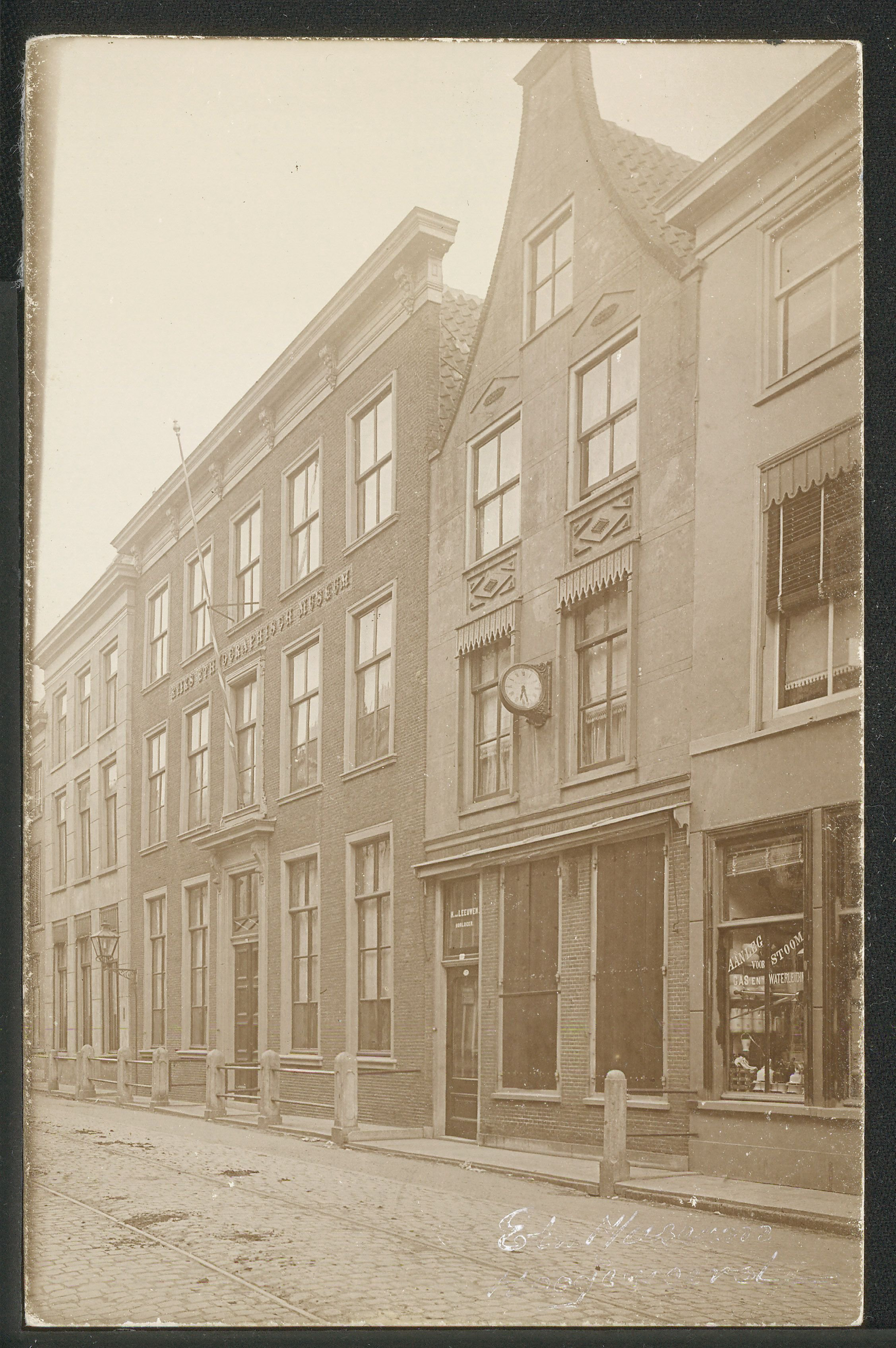 Gezicht op het Ethnografisch museum, voorloper van het Volkenkundig museum, aan de Hogewoerd 106-108.